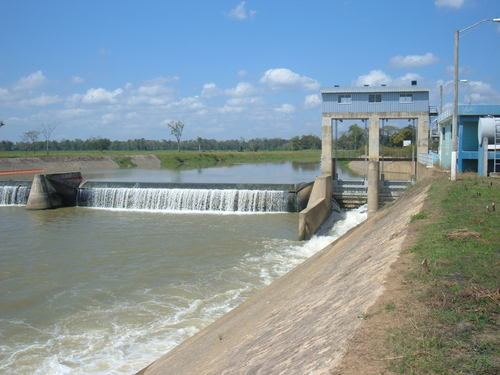 Dique, Arenoso